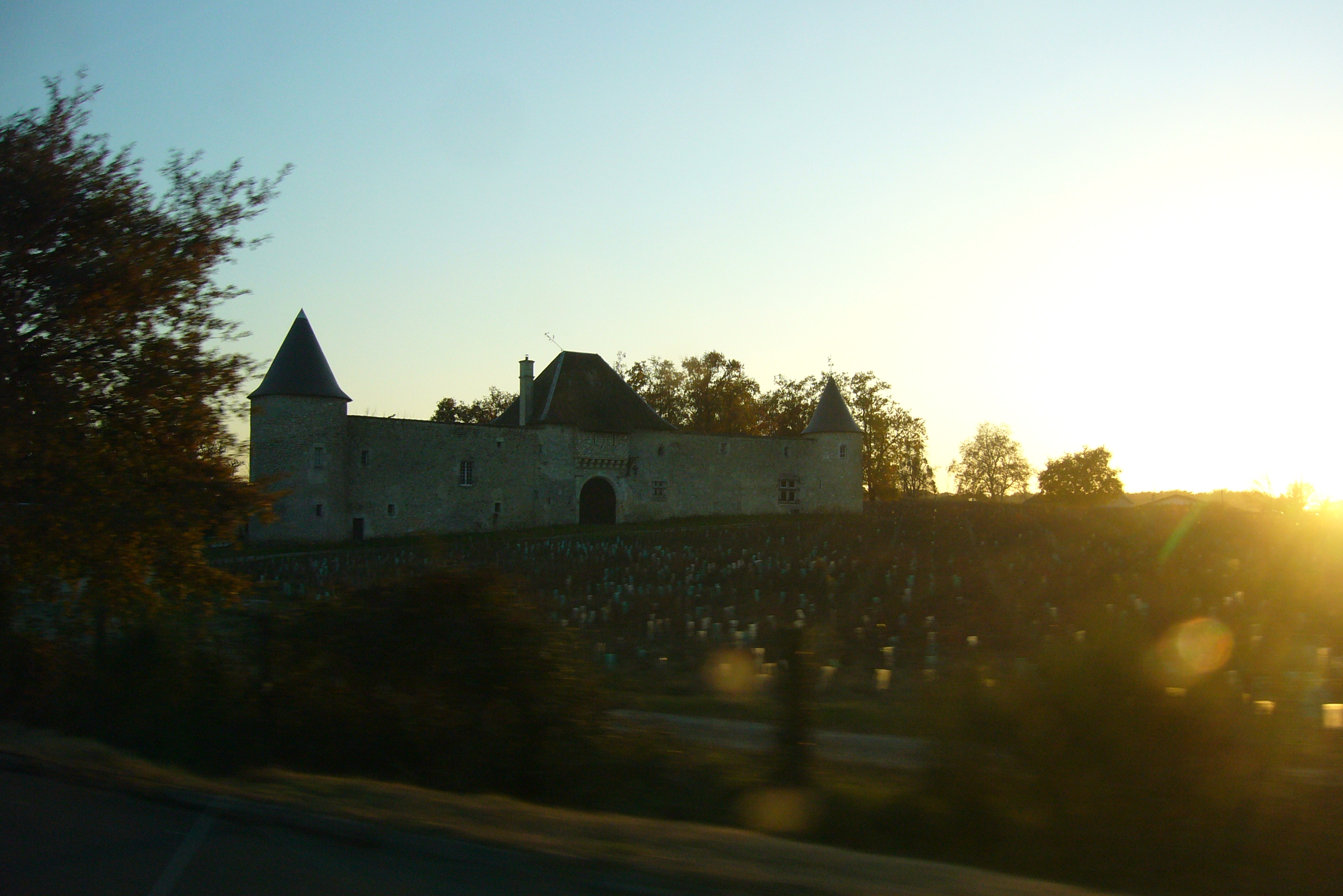 "château des Freytets Maintenant(château d'Eck) à Cadaujac France (44°44'40.06N)(0°32'20.50O)